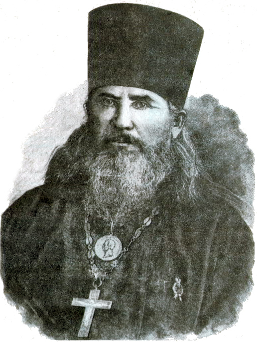 Тимофеев Василий Тимофеевич (1836 — 1895) — российский православный церковный деятель, миссионер, просветитель, педагог, первый кряшенский священник, заведующий Центральной крещёно-татарской школы, сотрудник Н. И. Ильминского. Репродукция из книги "Протоиерей о. Василий Тимофеев" (Казань, 1895)